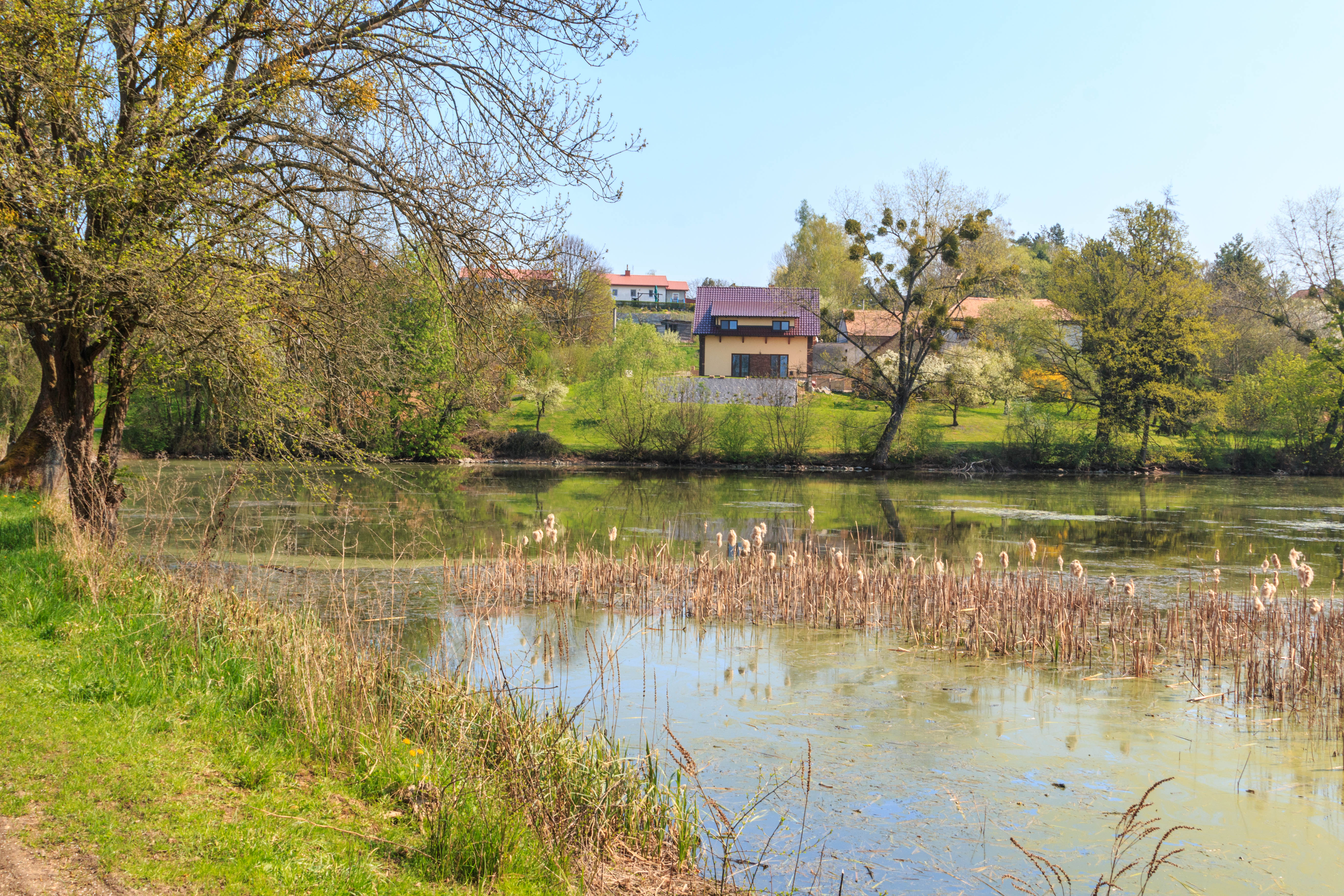 Dolní Jeníkovický rybník Project: Vodstvo.